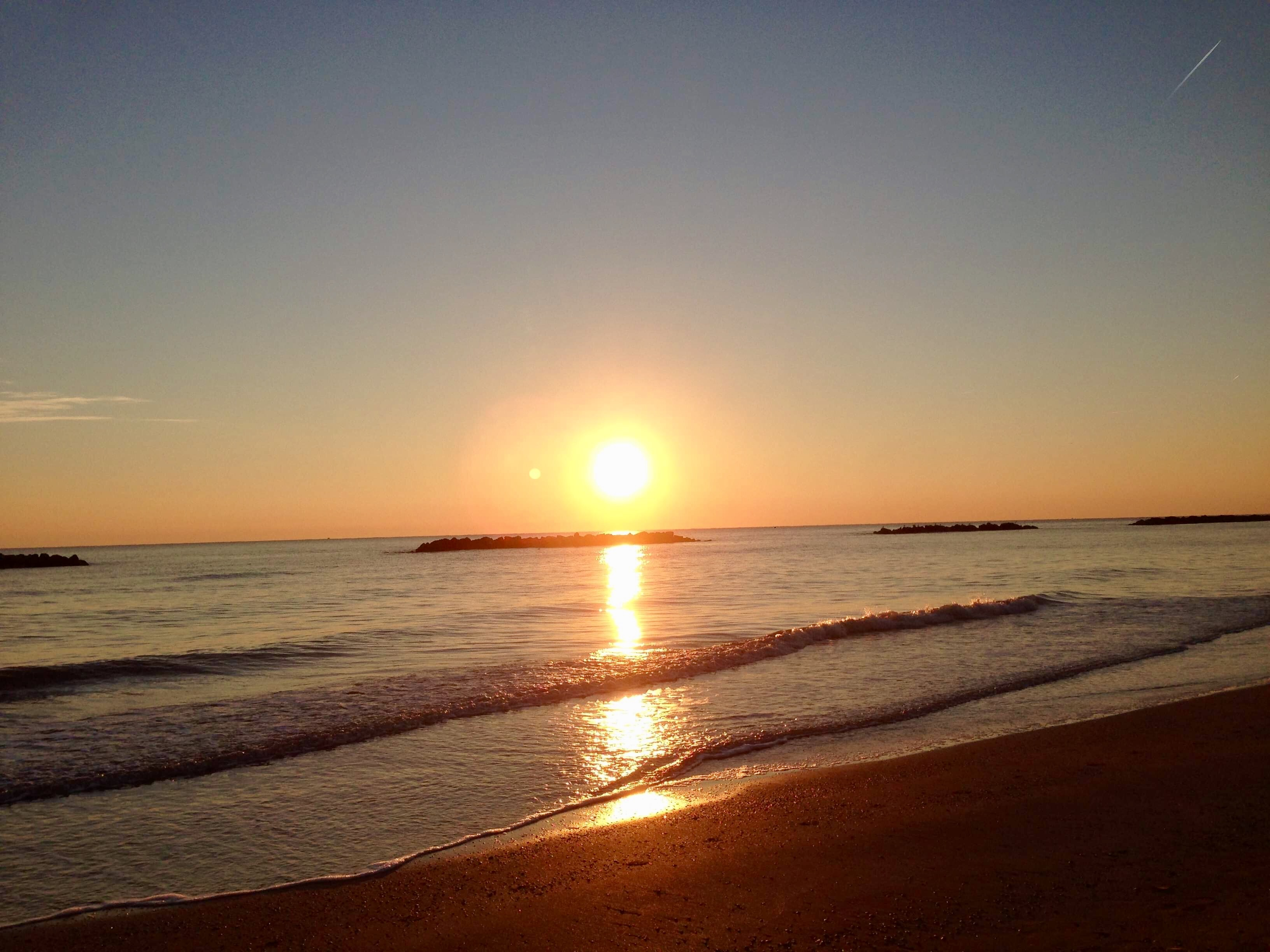 Foto della spiaggia di Porto San Giorgio scattata all'alba.